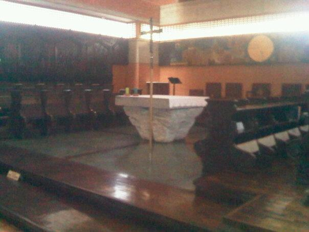 Altar y Sillines del Coro